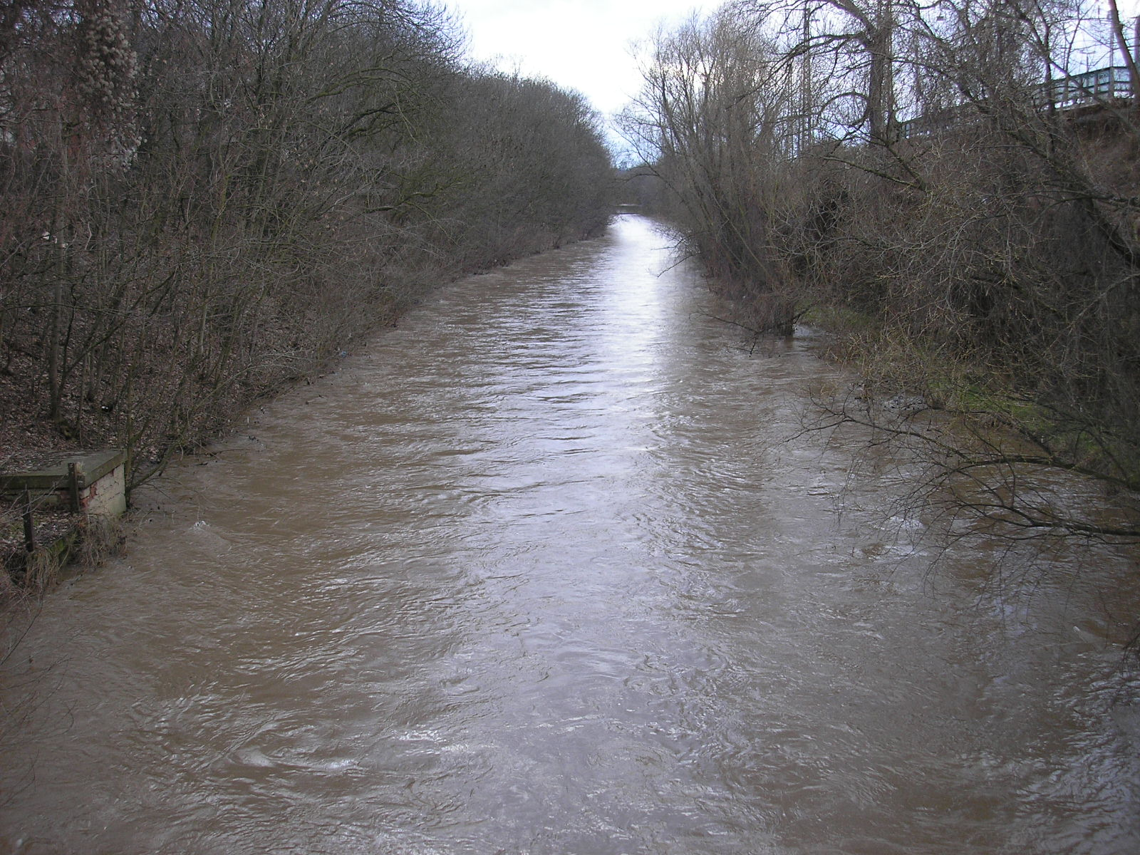 Die Gera (Flutgraben) am Erfurter Bahnhof.